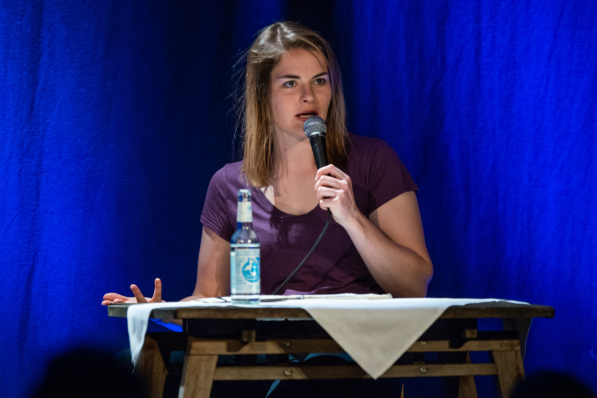 Comedy,Concertbüro Franken,Gutmann am Dutzendteich,Hazel Brugger,Kabarett,Slam-Poetin